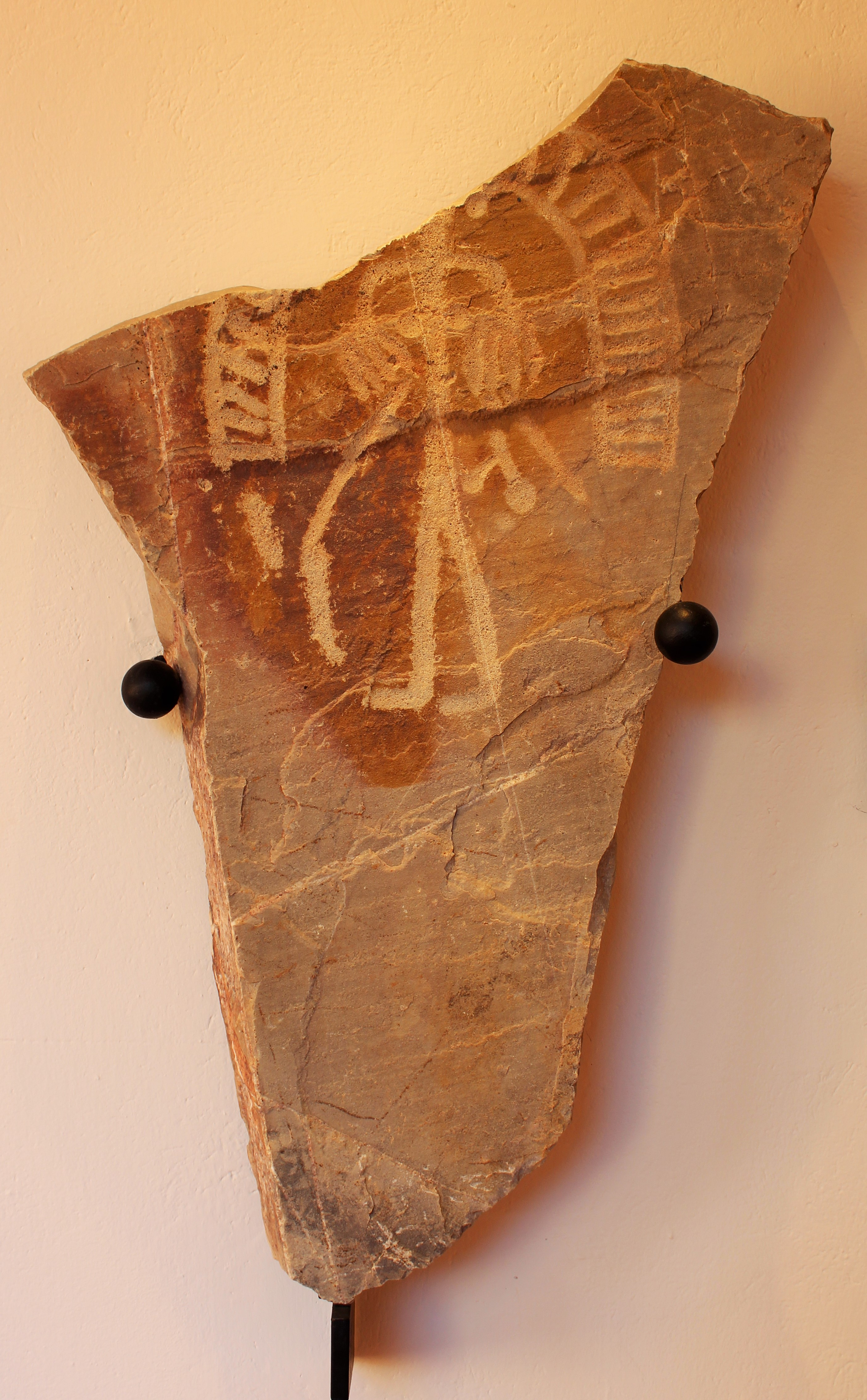 MAB-Esquema estela de guerrero. Siglo VII-VI a.C El Mato, Belalcázar, córdoba